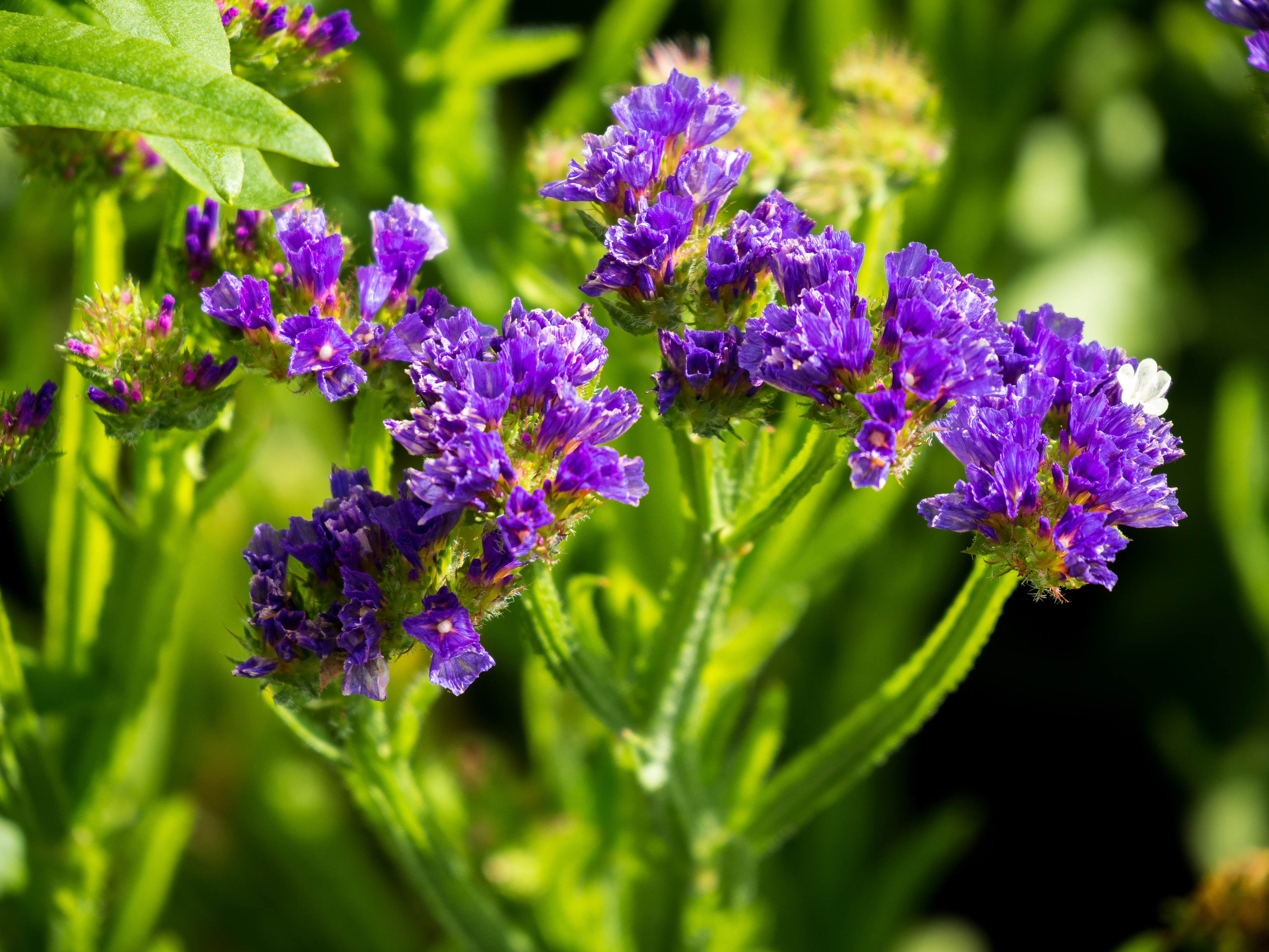 Der Geflügelte Strandflieder, lat. Limonium sinuatum, Blüte